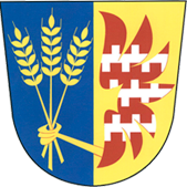 znak obce Klopotovice.